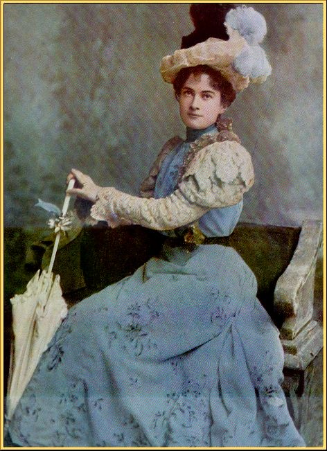 Une beauté de 1892.